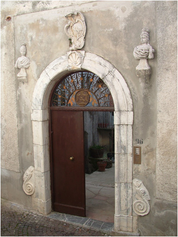 Latronico, provincia di Potenza, Italia; portale del palazzo Arcieri con elementi di pregio in marmo.